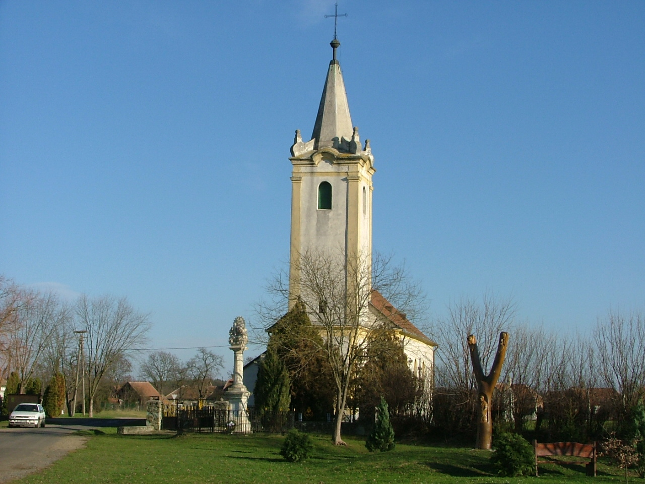 Bögöt Kirche